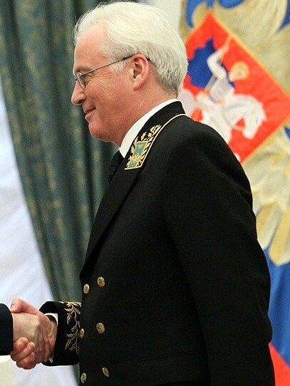 Постоянный представитель России при Организации Объединенных Наций в Нью-Йорке Виталий Чуркин на награждении орденом «За заслуги перед Отечеством» IV степени